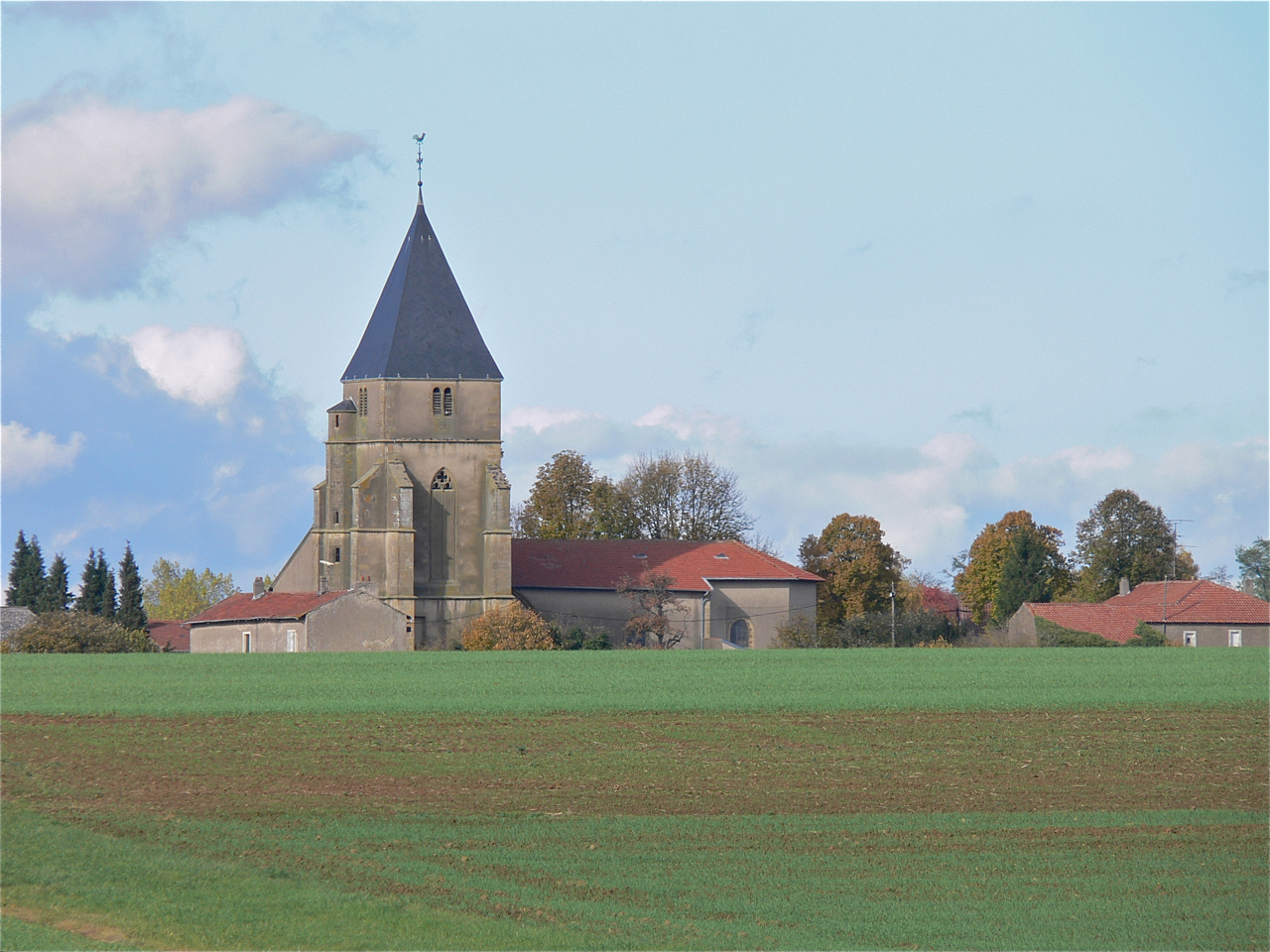 Panorama sur le village de Sainte-Barbe en Moselle, Lorraine, France. Le village est dominé par l'imposant clocher de l'ancien prieuré et est désormais le clocher de l'église paroissiale .